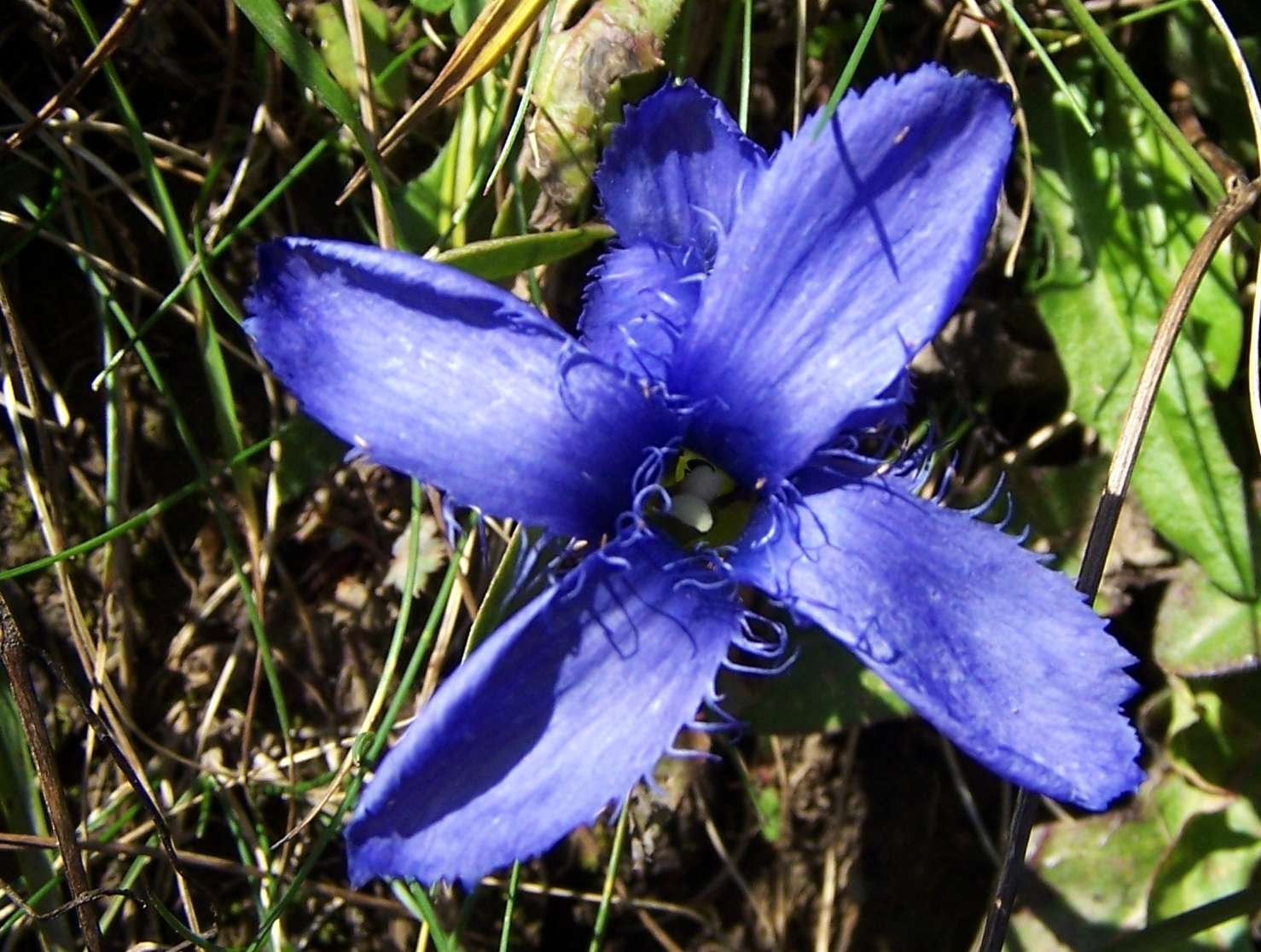 Gentianopsis ciliata (pl. goryczuszka orzęciona), habitat: Tatra Mountains, Hala Stoły